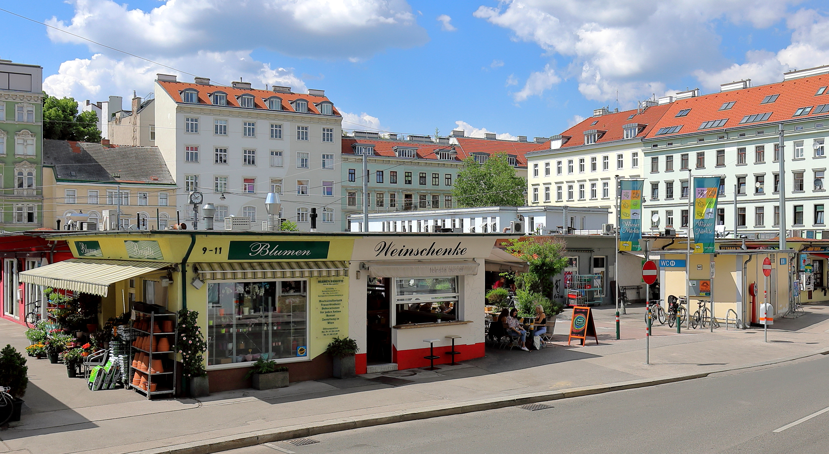 Der nordöstliche Bereich des Karmelitermarktes im 2. Wiener Gemeindebezirk Leopoldstadt. Der Markt wurde ursprünglich vor der Karmeliterkirche abgehalten und 1888 in die Karmelitergasse verlegt; ab 1893 befanden sich auf dem heutigen Standort bereits einige Markthütten, 1910 wurde der ganze Markt hierher verlegt. Mitte der 1990er Jahre wurde unter dem Marktareal eine Tiefgarage errichtet und gleichzeitig der Markt modernisierend umgestaltet.